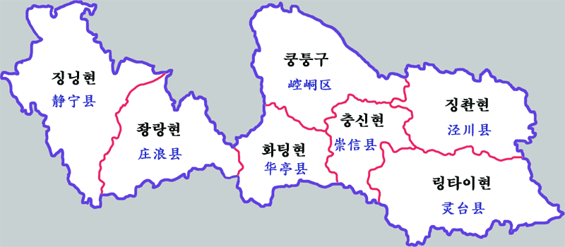 핑량시 현급구역도